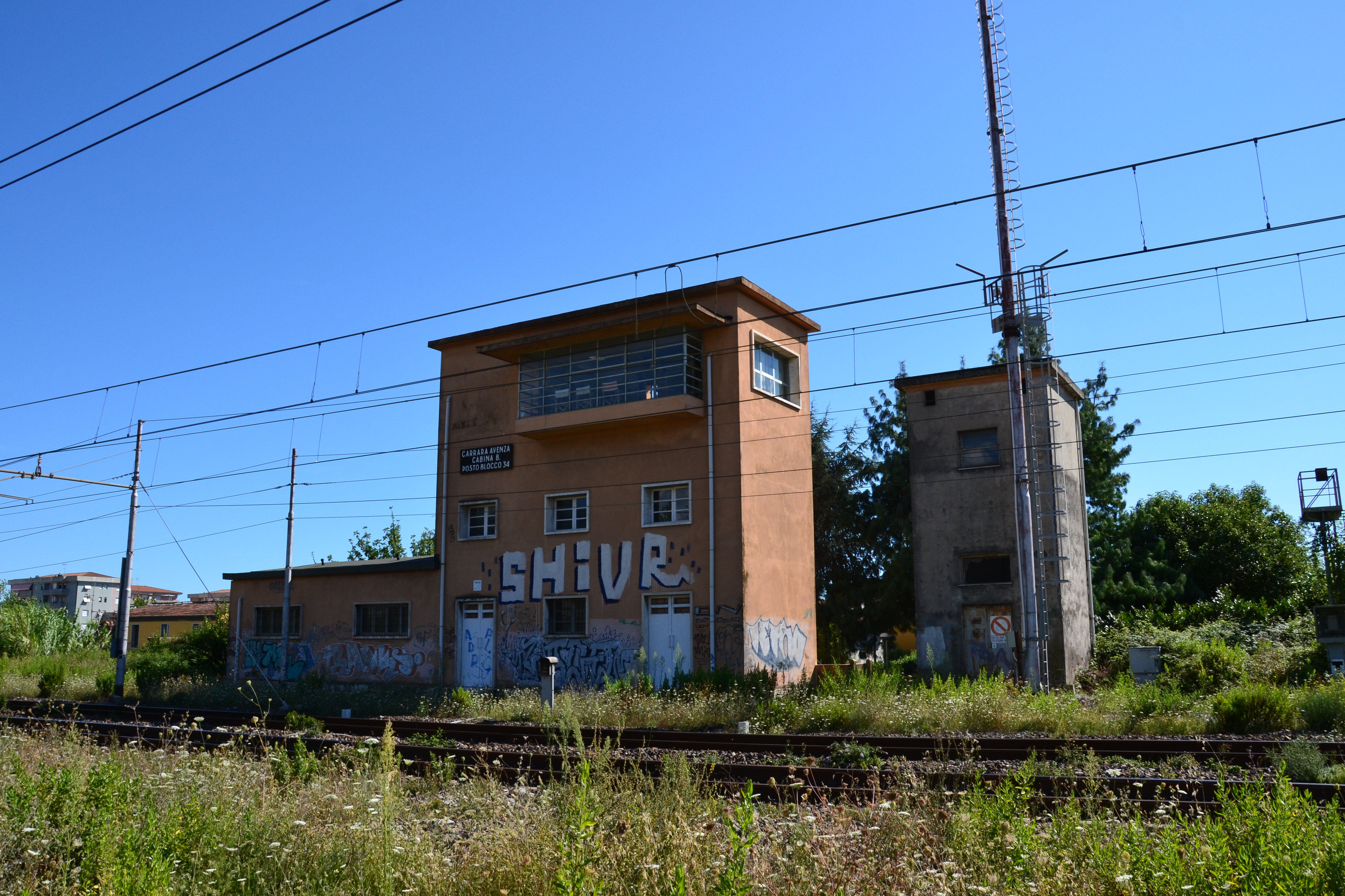 La vecchia cabina di blocco che comandava il piazzale sud della stazione.